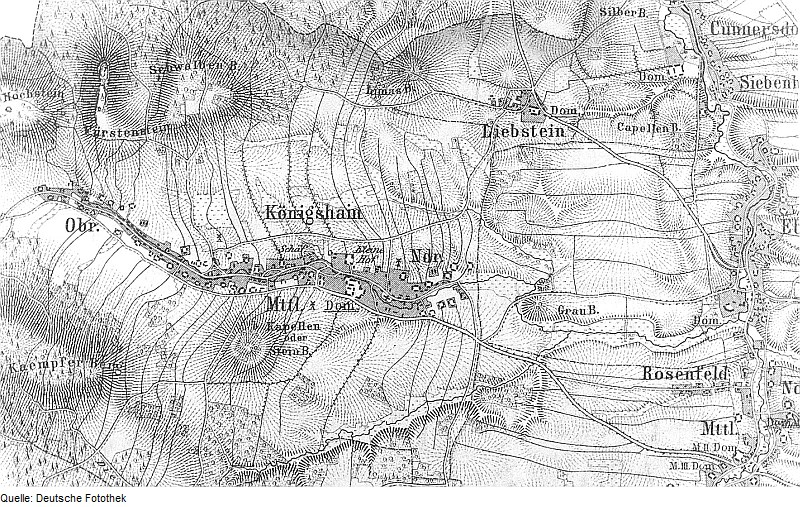 Original image description from the Deutsche Fotothek Königshain. Karte des Kreises Görlitz, Maßstab 1 : 50.000, ca. 1905 (Sign.: VII 171)